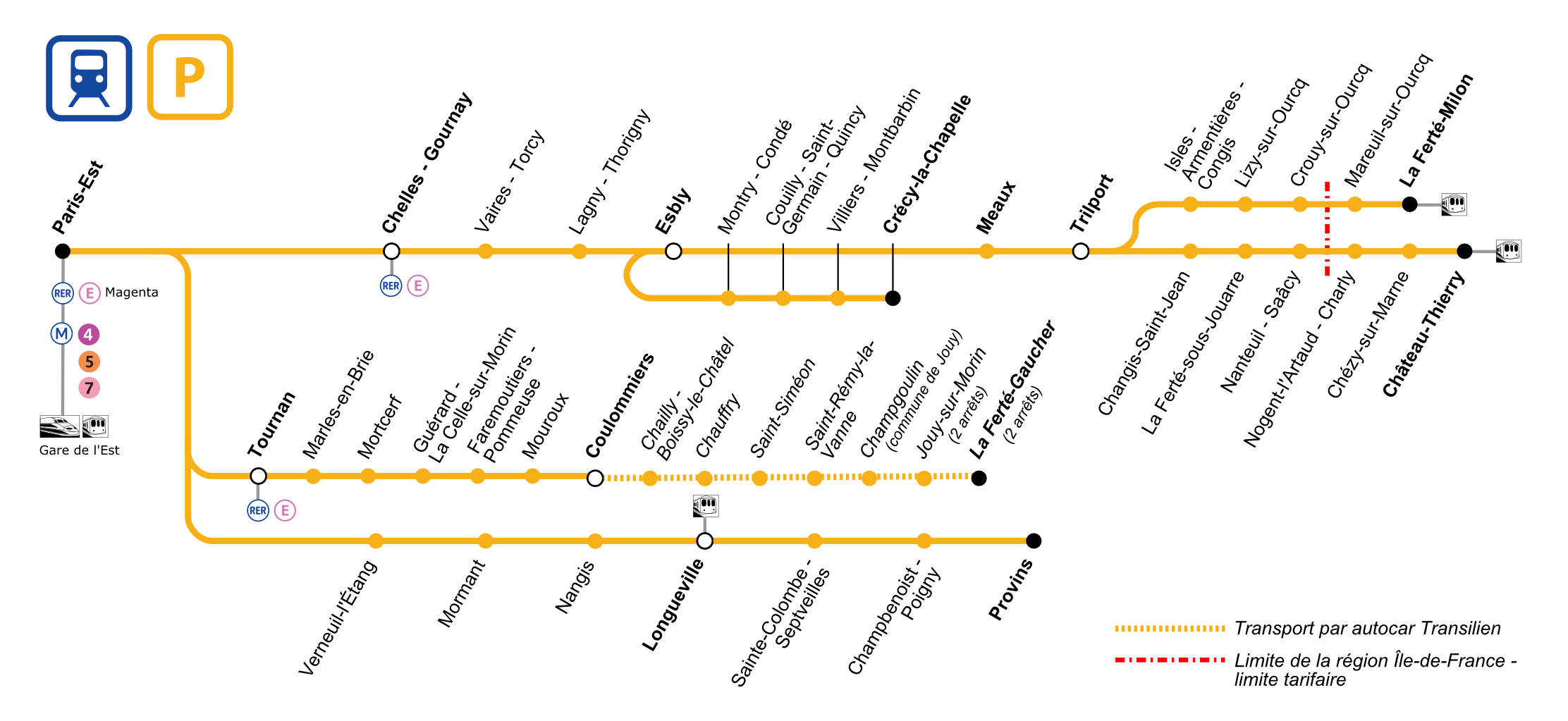 Plan schématique de la ligne P du Transilien avec indication des correspondances (RER, Transilien, métro et tram).